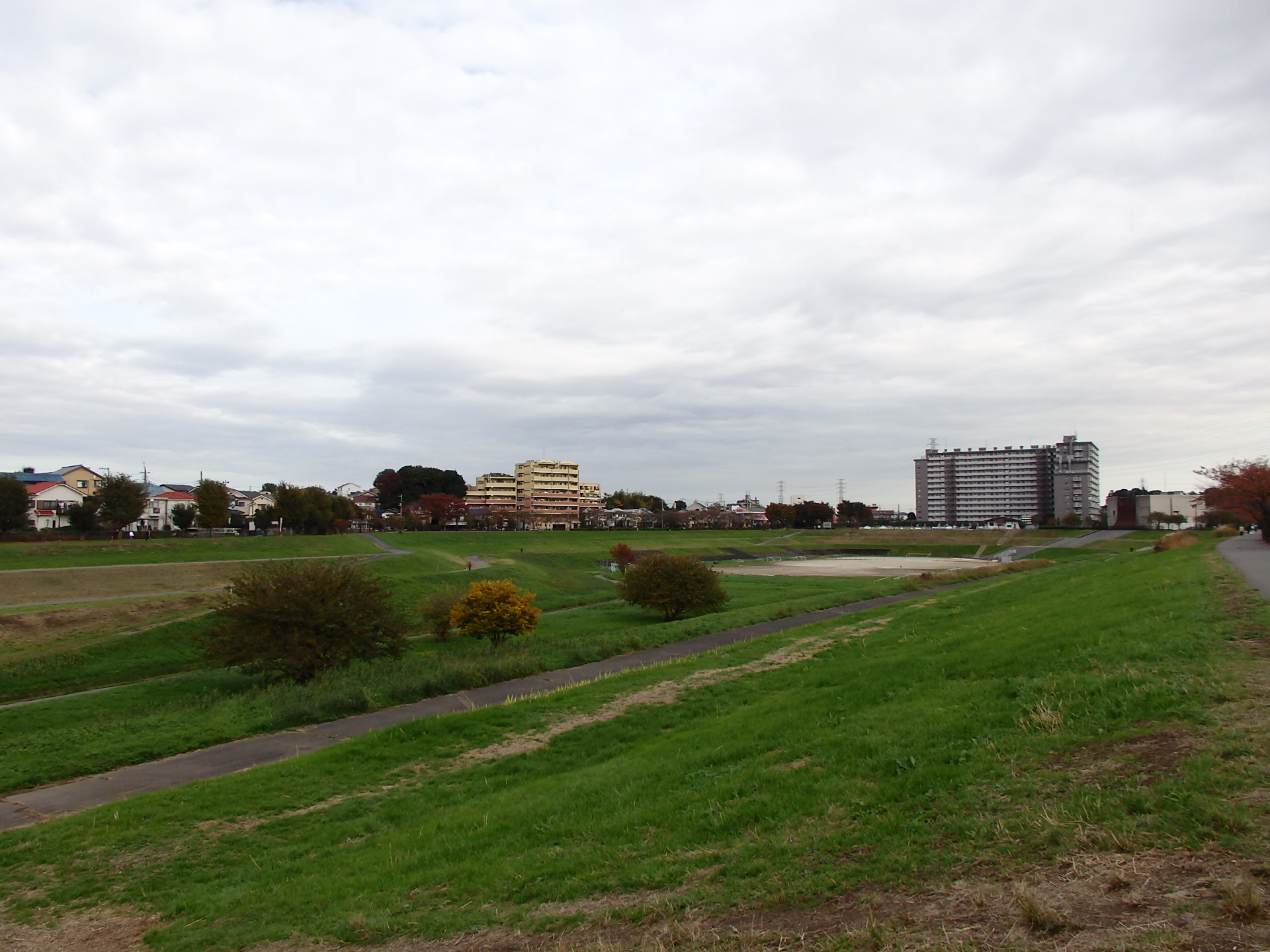 上谷沼調節池西側